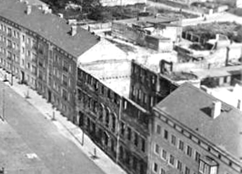 Die Ruine des Palis Waldersee in der Dessauer Zerbster Strasse am 17. Oktober 1953 vom Turm des Rathauses aus gesehen.